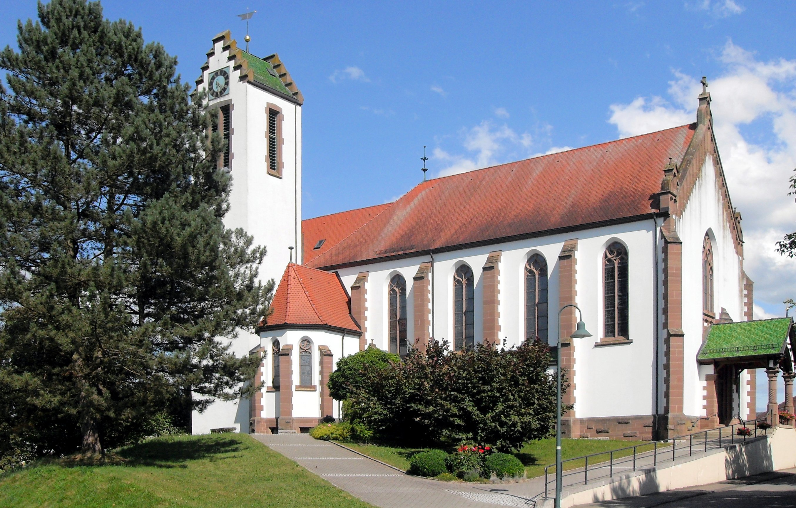 Kirche St. Peter und Paul in Orsingen, Gemeinde Orsingen-Nenzingen